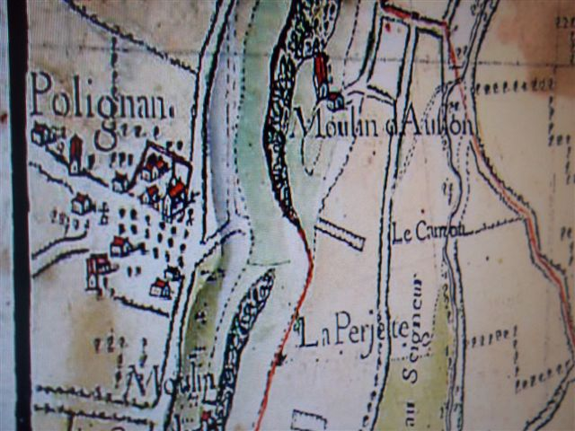 carte de la Prairie - extrait de "Carte des terres d'Ausson et de Taillebourg [Haute-Garonne] avec les arpentages des héritages qui dépendent du domaine du seigneur faisant partie du marquisat de Montespan, levé par Hippolyte Matis, s.d. [1716-1717]" AD78 A325